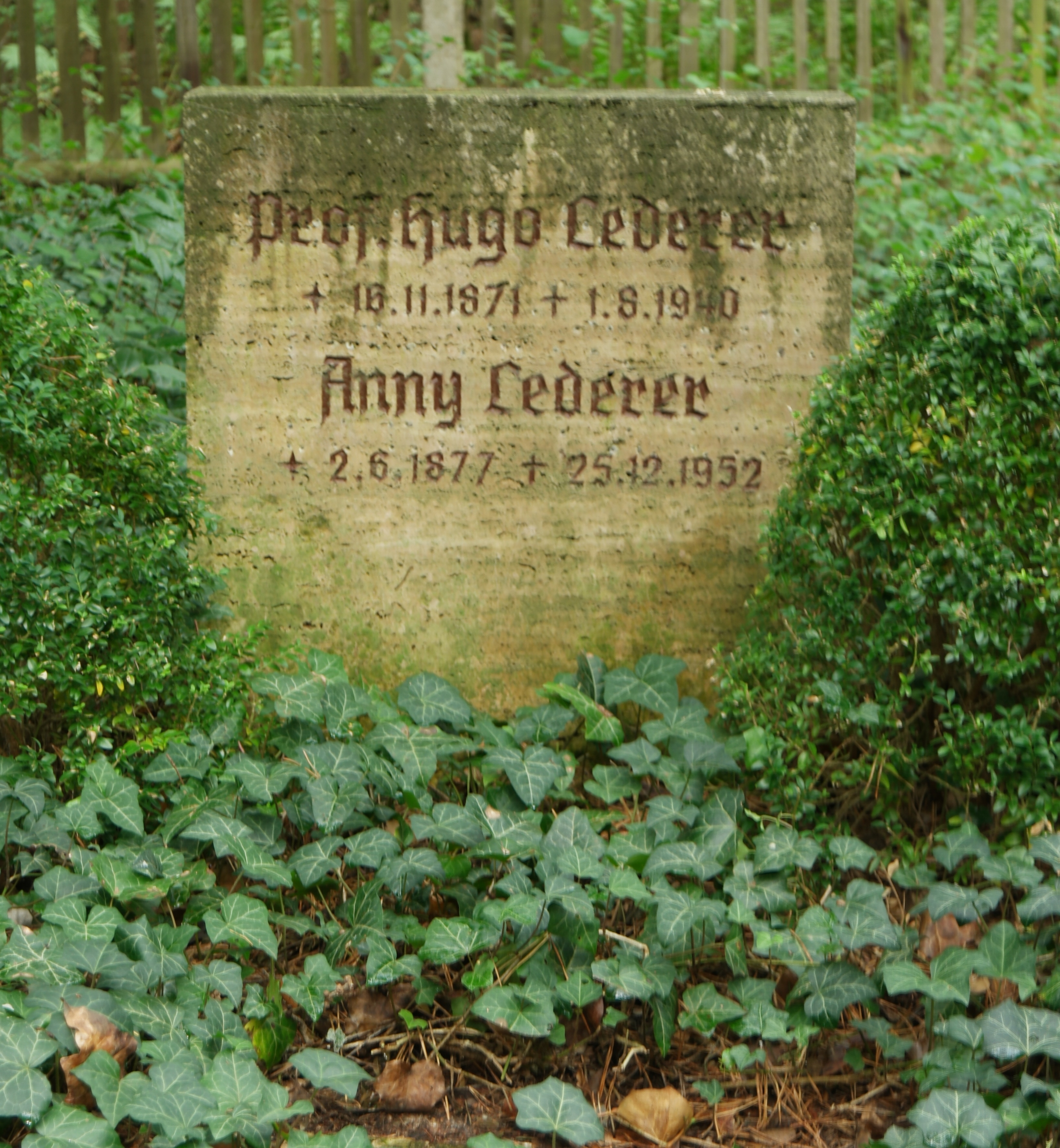 Grab des Bildhauers und Medailleurs Hugo Lederer (1871-1940) auf dem Wilmersdorfer Waldfriedhof in Stahnsdorf